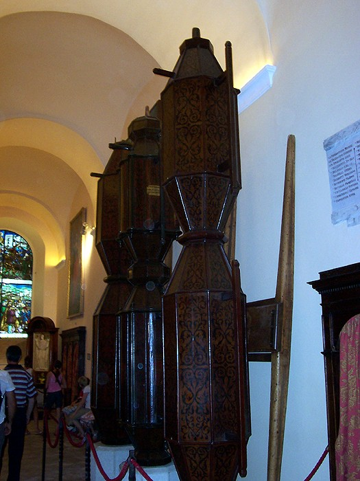 Gubbio - i 3 ceri custoditi nella Basilica di S. Ubaldo